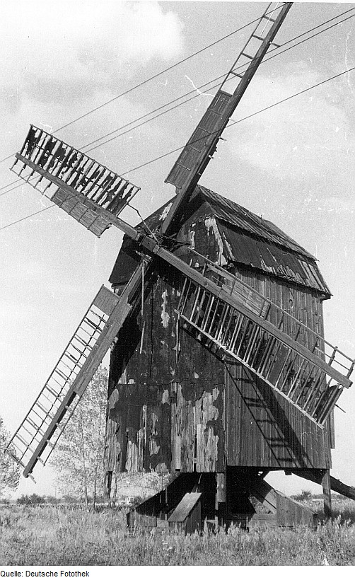 Original image description from the Deutsche Fotothek Jessen (Elster)-Schöneicho. Bockmühle